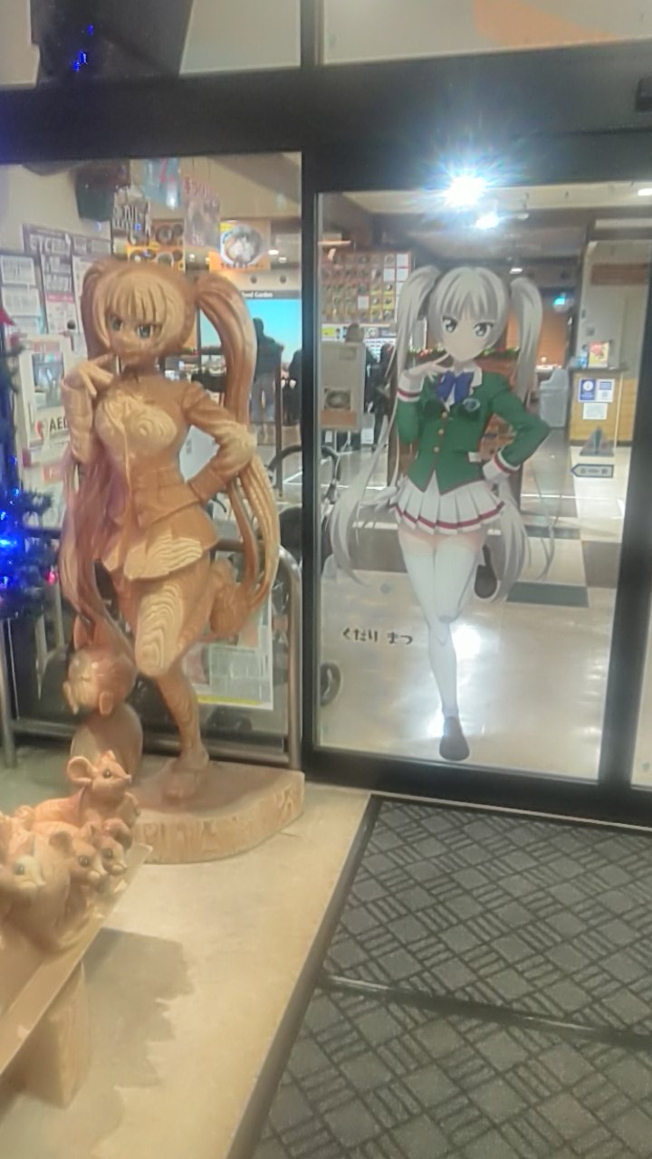 周南市で開催されている「萌サミット」とのタイアップ